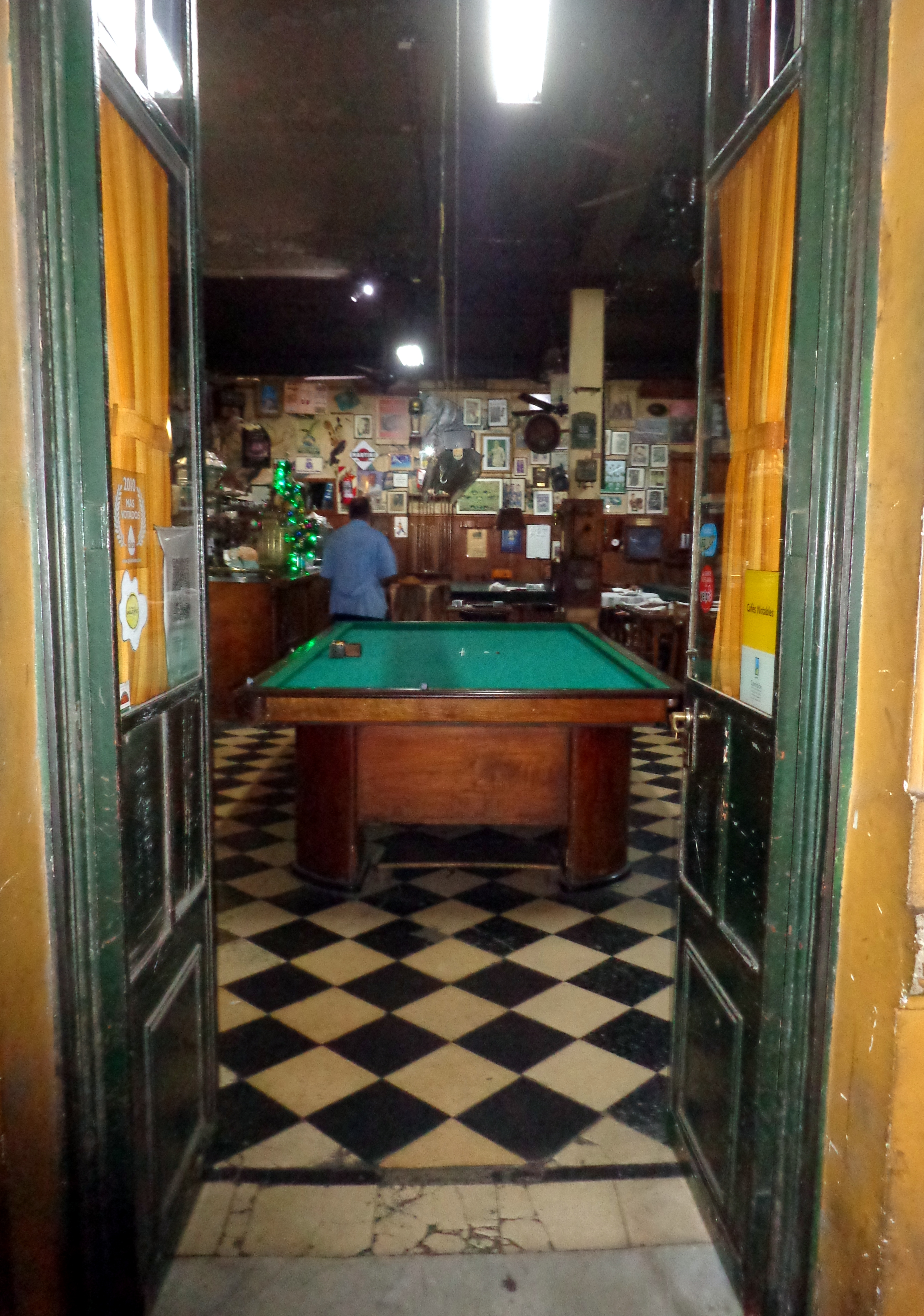 Salón principal, en el Café de García, Calle Sanabria 3302 (esquina con José P. Varela), Villa Devoto, Buenos Aires, Argentina.